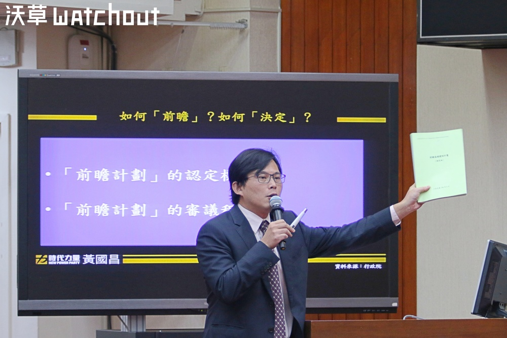 時代力量立法委員黃國昌今日質詢時痛批，國家發展委員會並未記取馬英九政府時藉特別預算推動建設造成國債激增的教訓，推出內容粗糙的「前瞻基礎建設特別條例草案」，令人失望。（攝影／蕭長展）